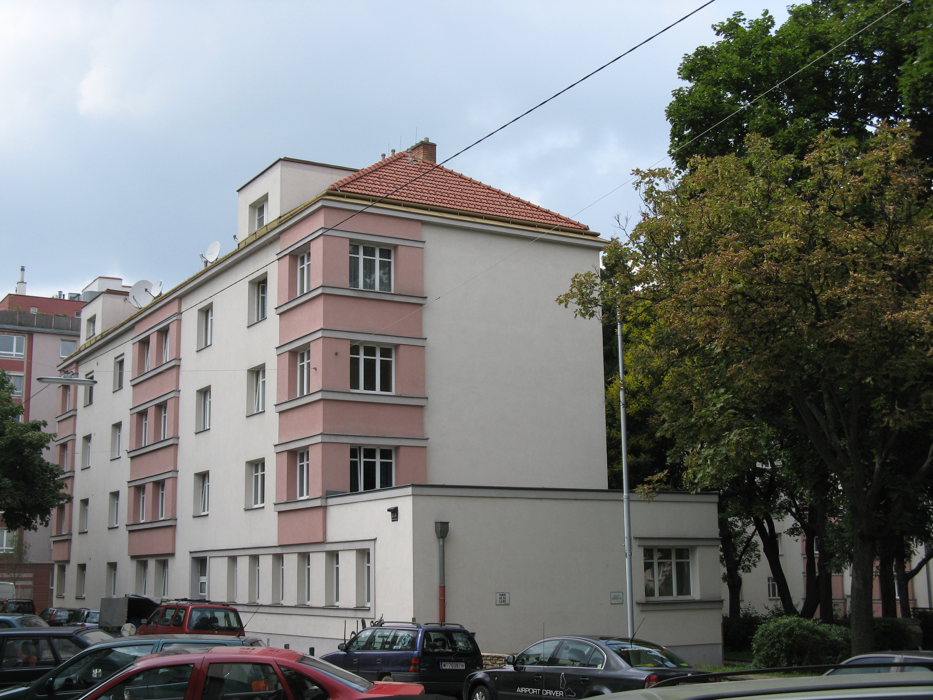 Wohnhausanlage (1936-38), Puchsbaumgasse 24-36, Wien-Favoriten This media shows the Vienna residential building (Gemeindebau) with the ID 754.